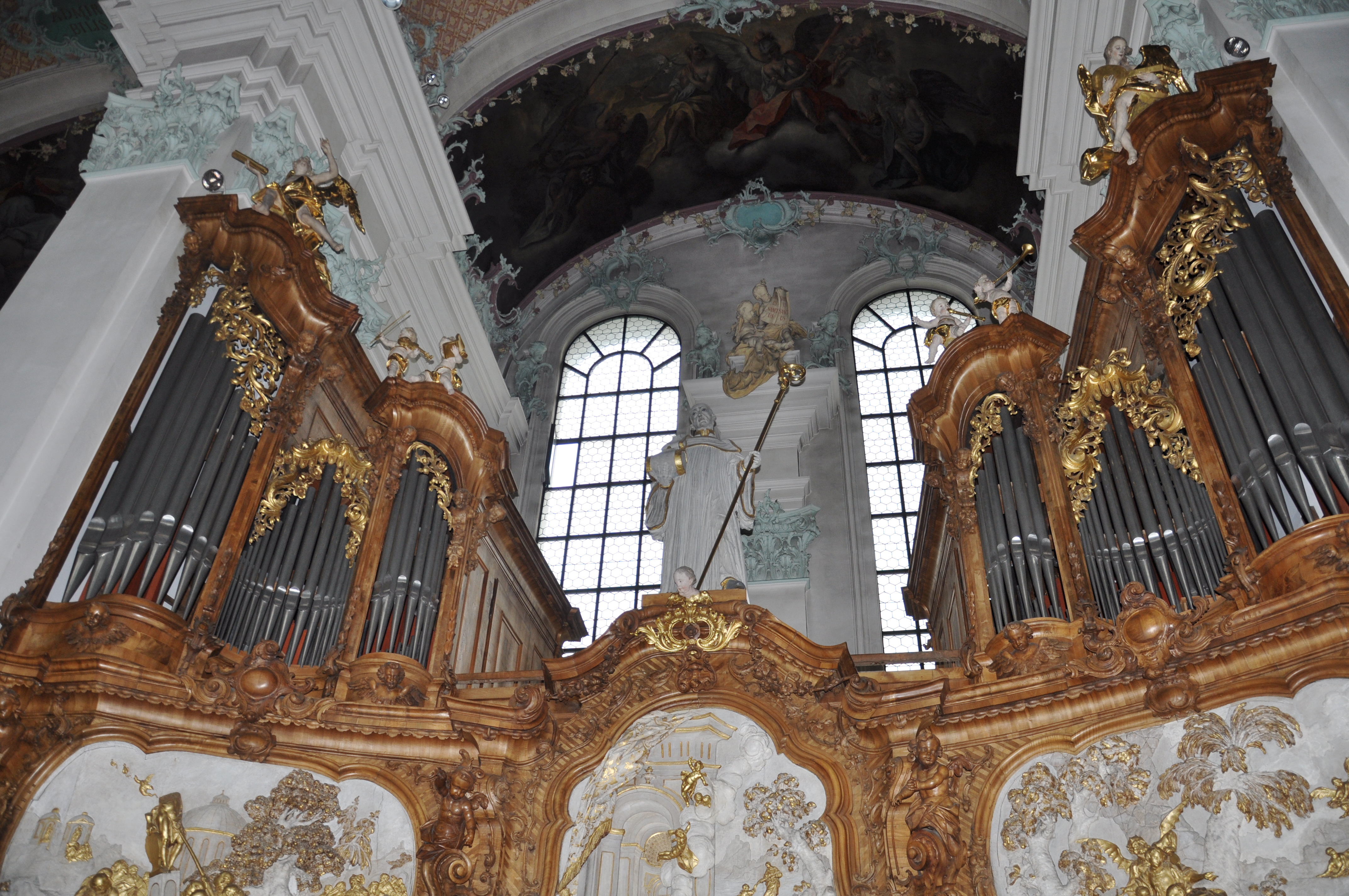 St. Gallen, Stiftskirche, Nördliche Chororgel, Prospekt